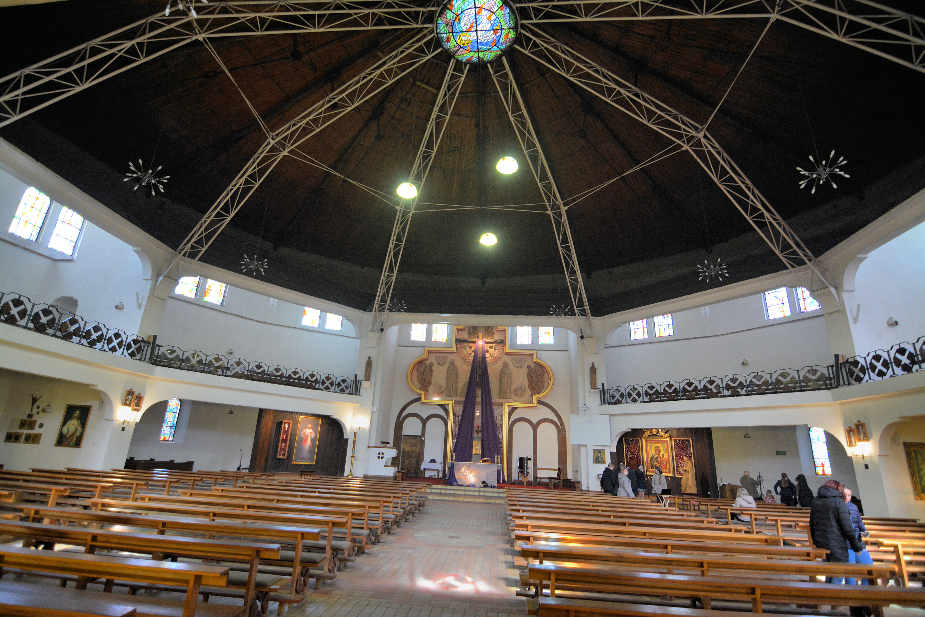 Kościół Matki Boskiej Jasnogórskiej w Szczecinie (dawna wieża ciśnień na Wzgórzu Hetmańskim)